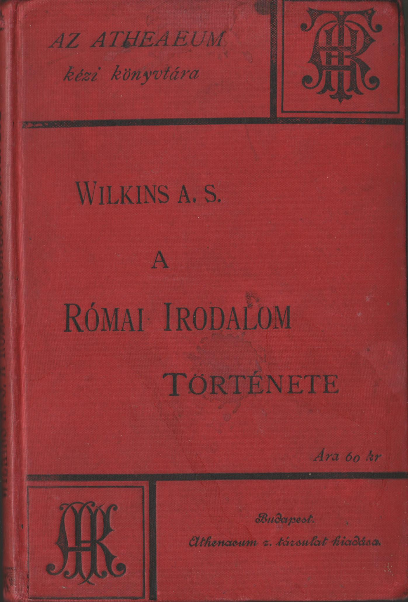 Az adott mű borítója.